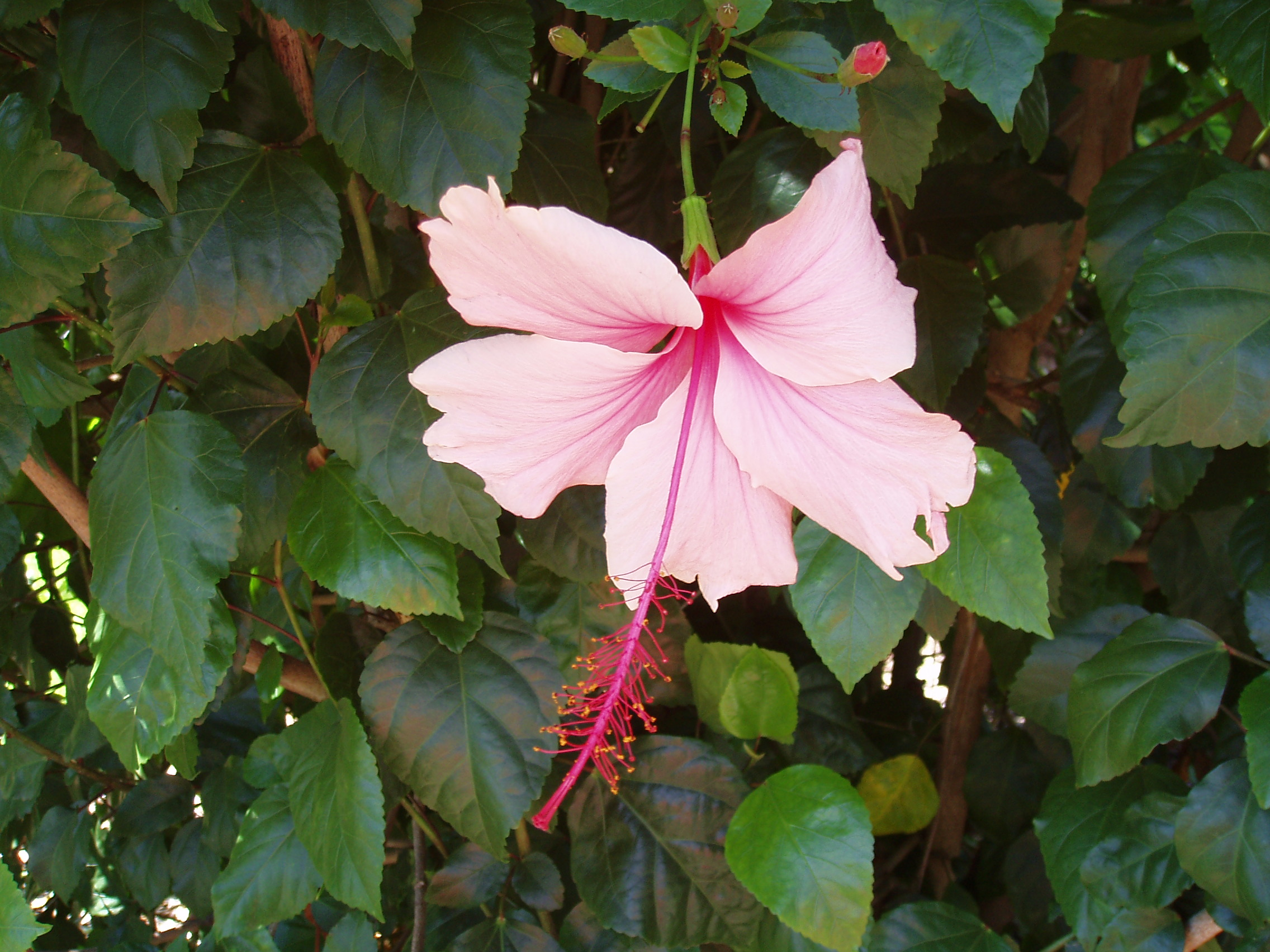 Hibiscus 'Albo Laciniatus'